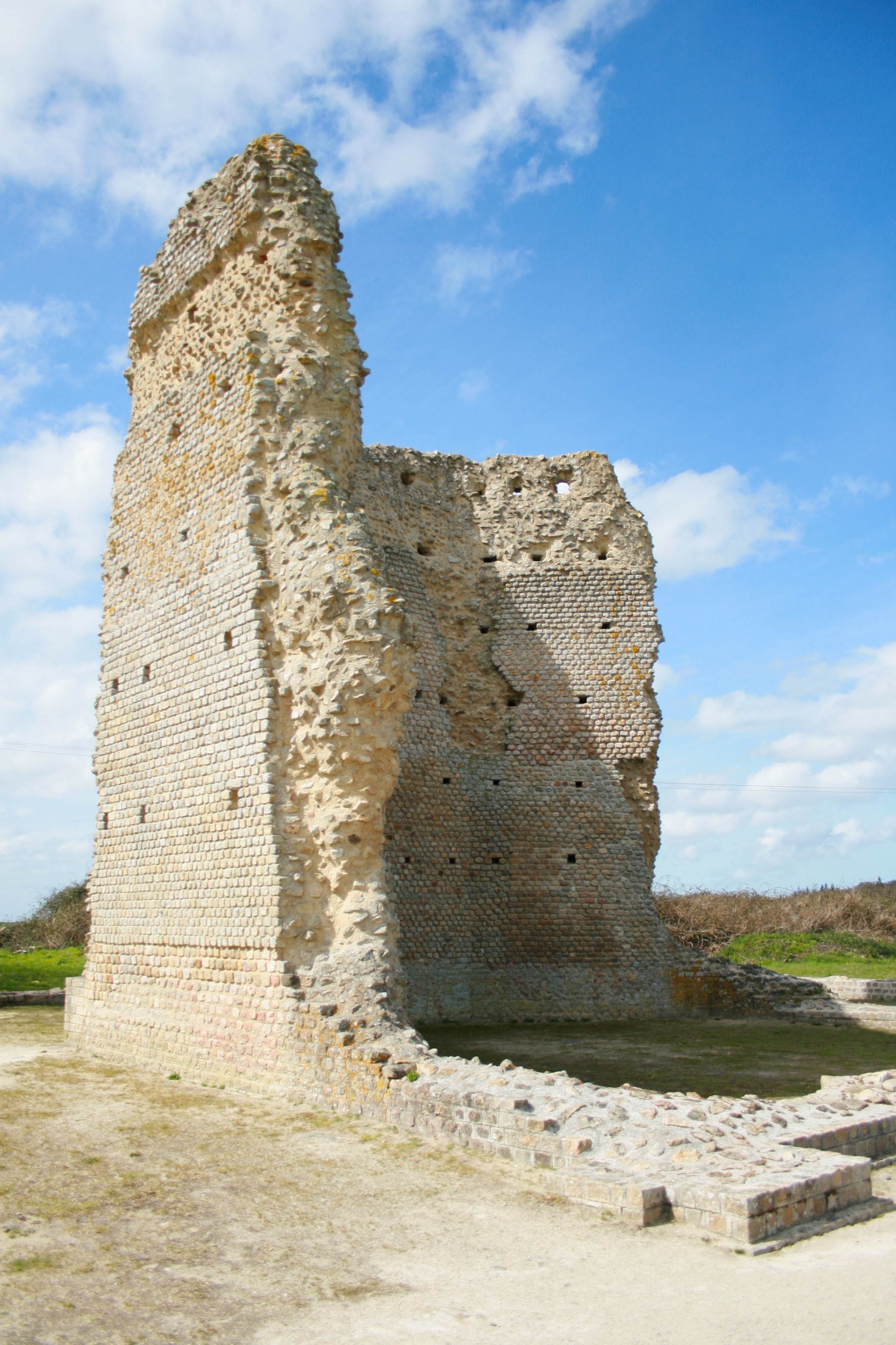 Sanctuaire des Coriosolites dit "temple de Mars" à Corseul. C'est le vestige gallo-romain le plus haut de Bretagne.